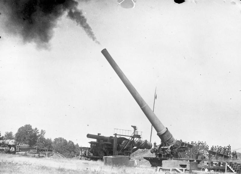 Amerikas grösste Kanone feuert ! Die grösste amerikanische Küstenbatterie beim Abschuss. Die Geschosse haben eine Reichweite von ca. 200 km. Information added by Wikimedia users.US 16"/50 caliber Mark 2 or Mark 3 ex-Navy gun firing on an Army coast defense mount. The weapon behind it is on a disappearing carriage.